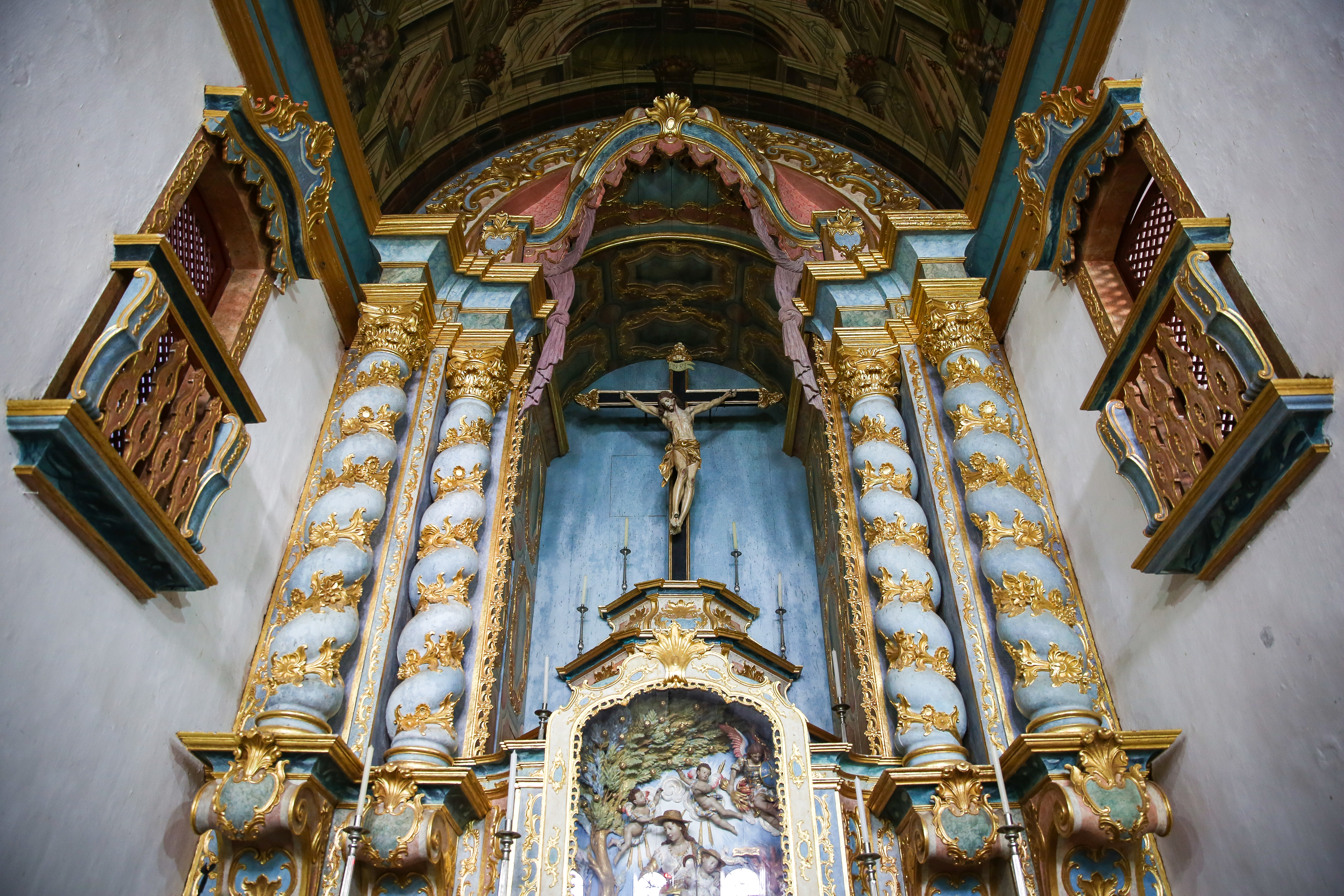 Além de participar do Circuito #CulturaGeraFuturo, o ministro também visitou nesta sexta-feira as igrejas de Nossa Senhora da Conceição da Comandaroba e Matriz Sagrado Coração de Jesus, na cidade histórica de Laranjeiras, e o Santuário da Divina Pastora, na cidade de mesmo nome, todas tombadas pelo Instituto do Patrimônio Histórico e Artístico Nacional (Iphan). Sá Leitão participou ainda da solenidade de comemoração de aniversário da Associação Comercial e Empresarial de Sergipe, que completa 146 anos neste sábado (26). 25.5.2018 Fotos: Clara Angeleas/MinC